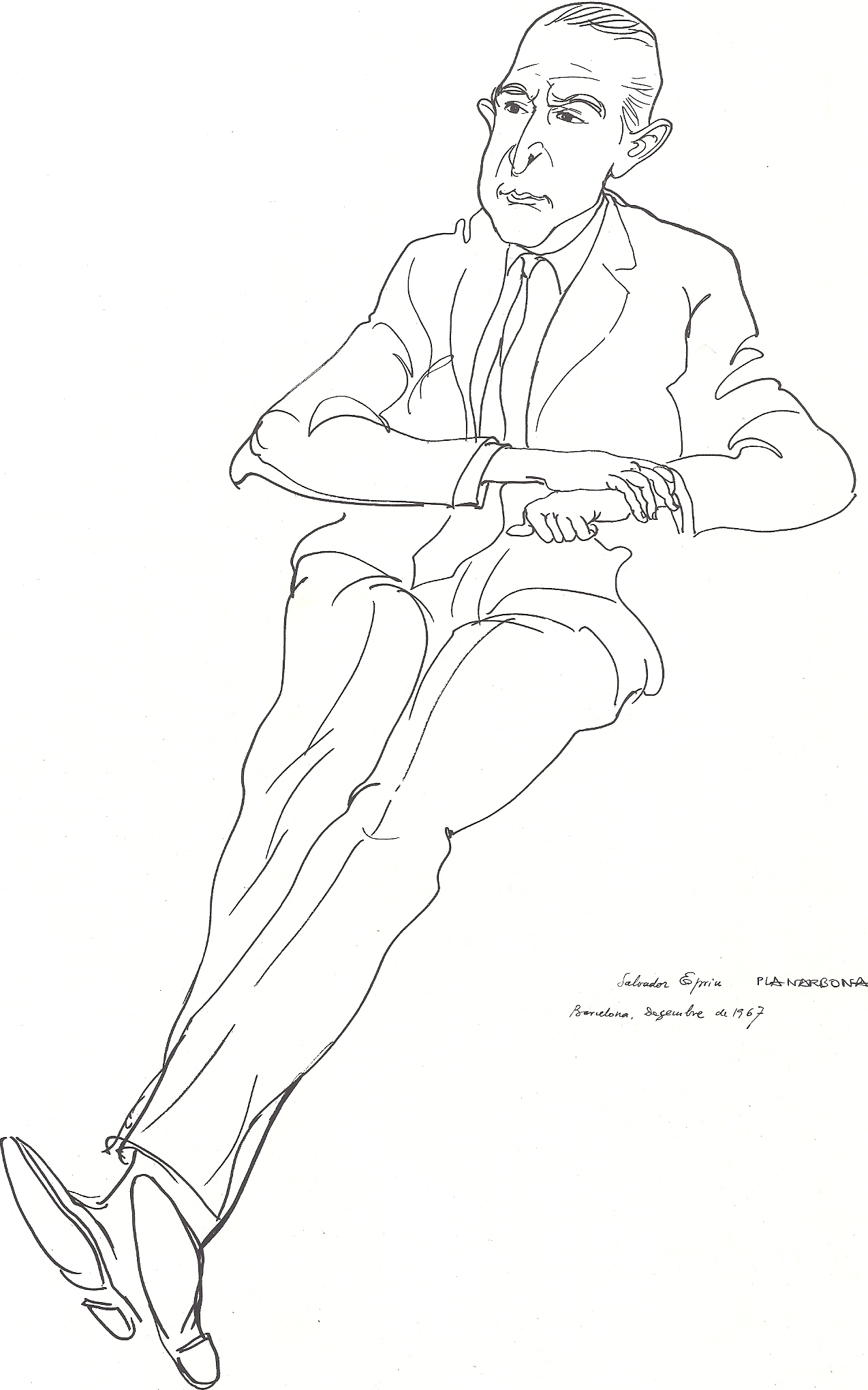 Retrat de Salvador Espriu per Josep Pla-Narbona